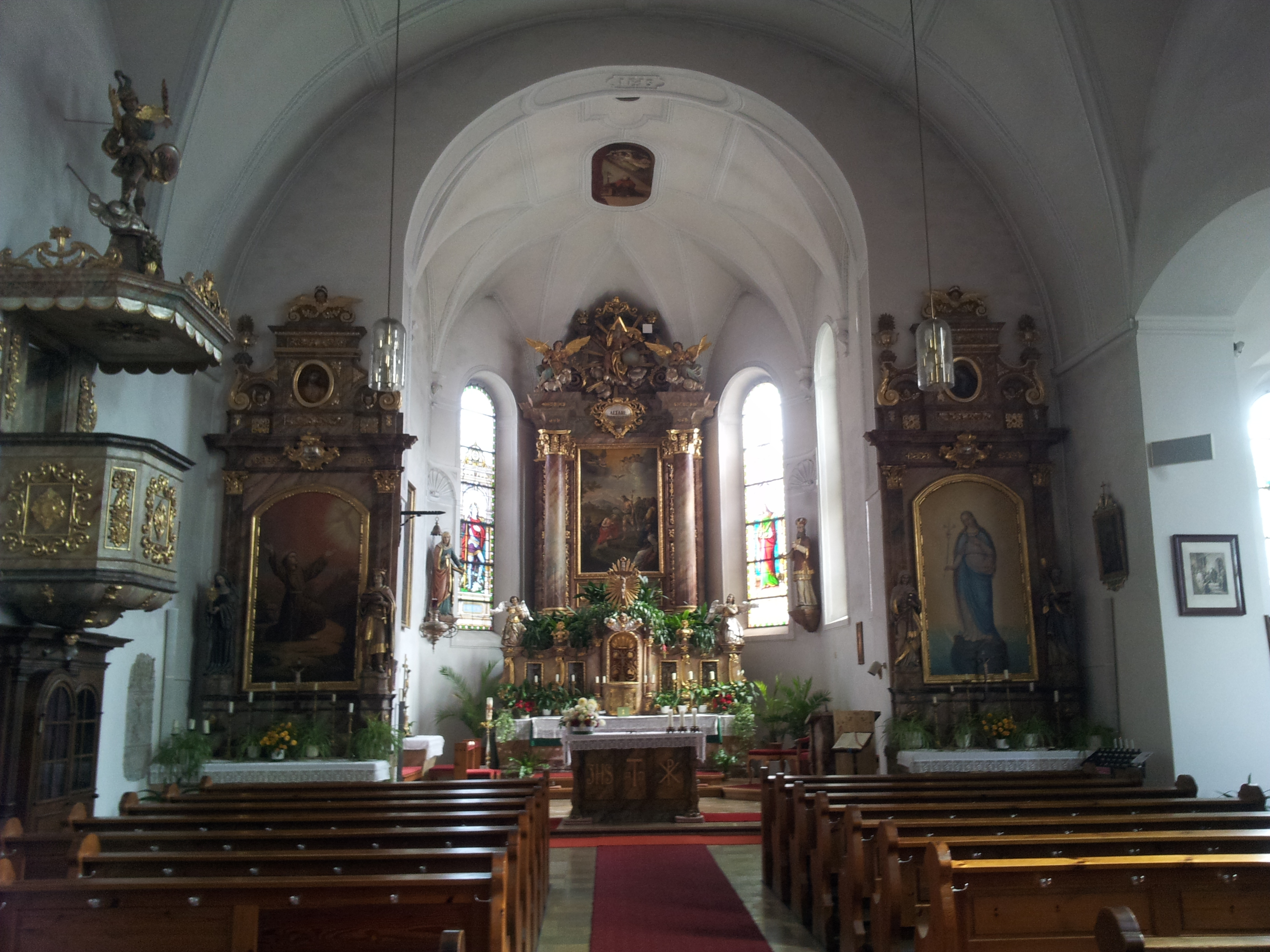 Innenansicht